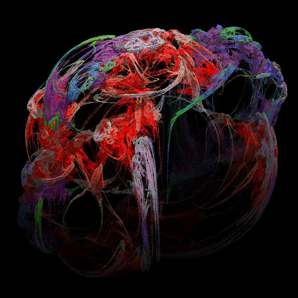 Fraktalkonst, titel "Bloody mess" Kategori:Bilder av fraktaler